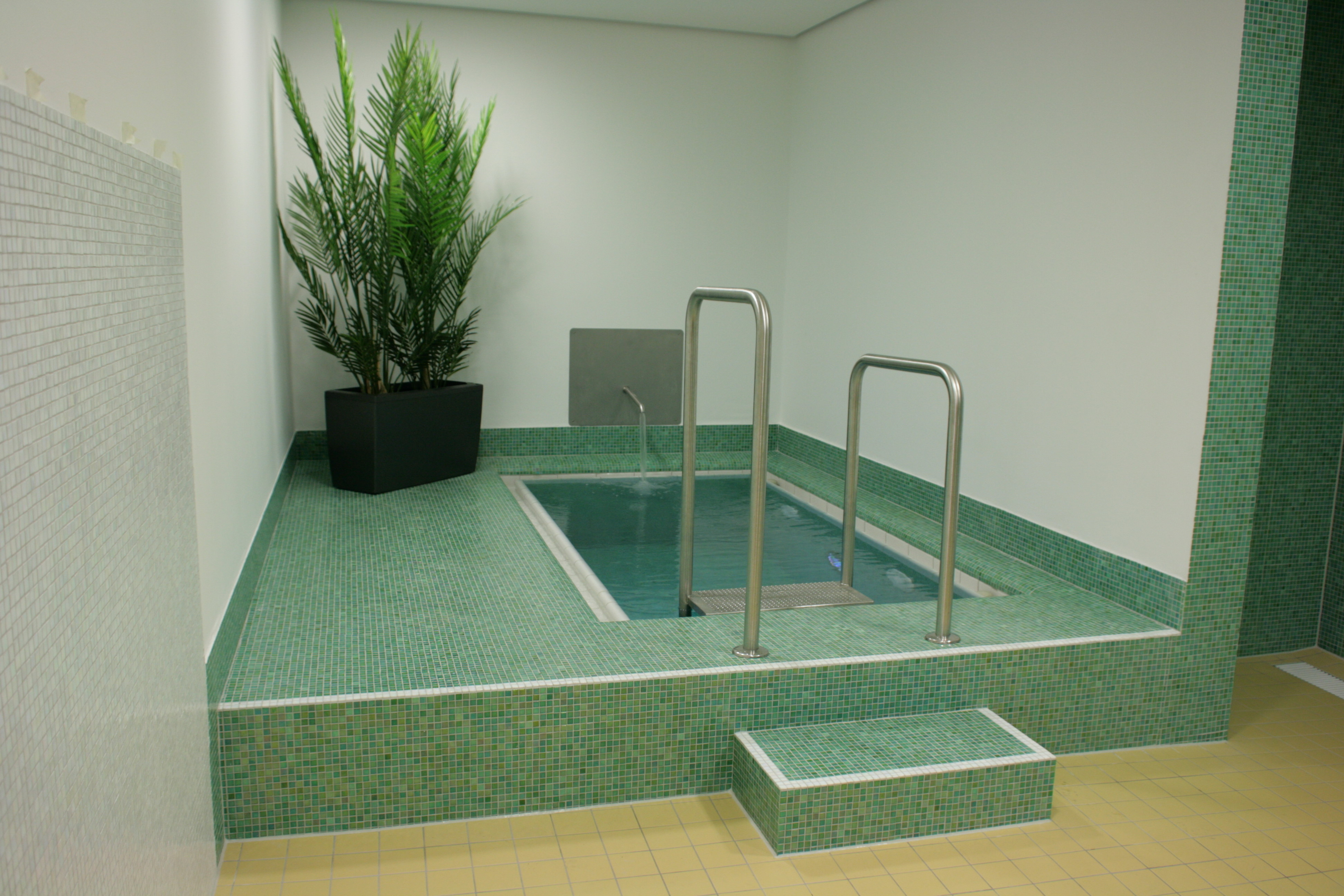 Schwimmoper in Wuppertal am Tag der offenen Tür (26.03.2010) anlässlich der Neueröffnung